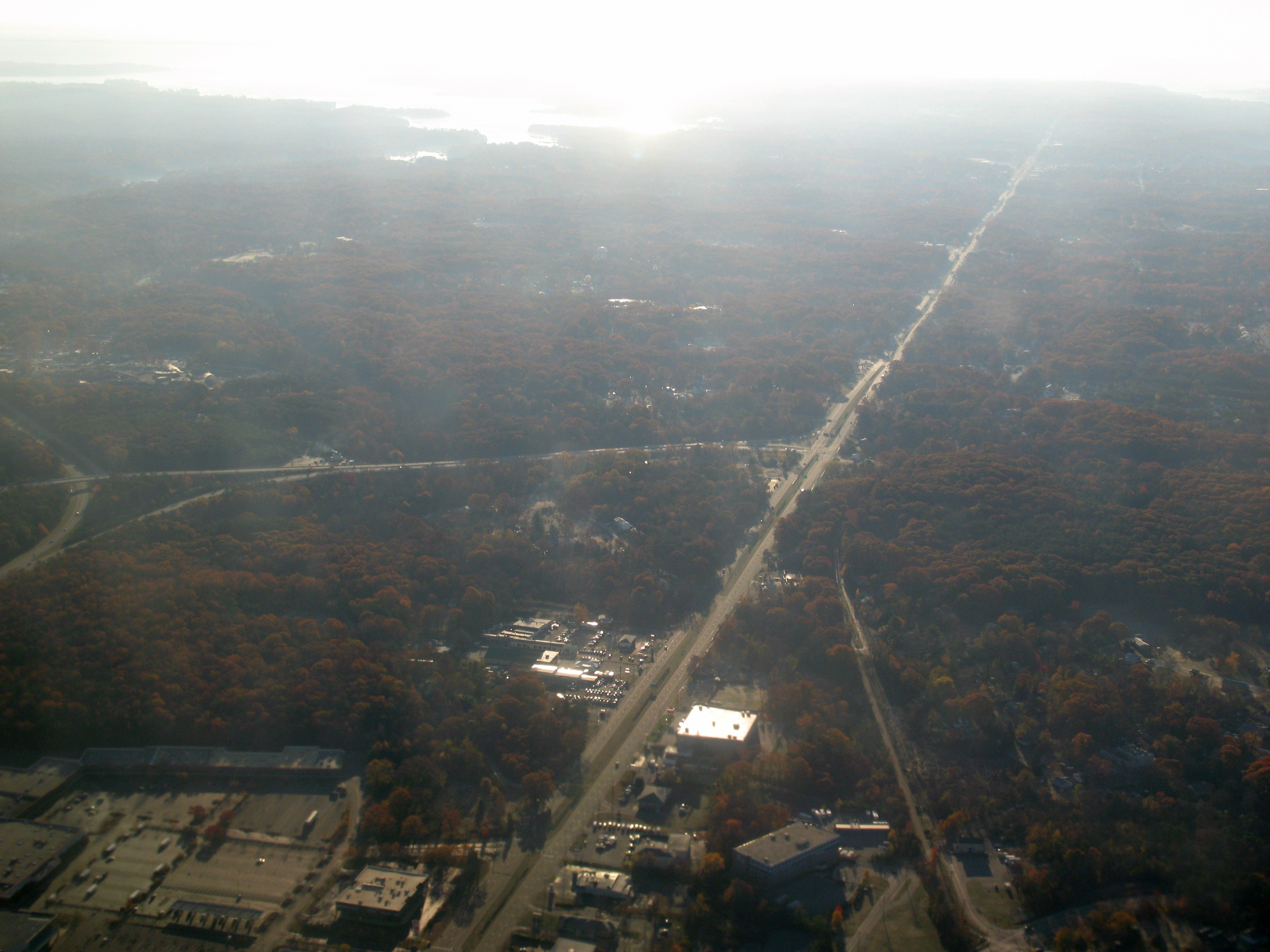 2007 11 24 - 228 - Pasadena - MD2 at MD10